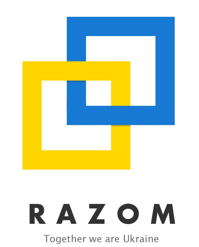 логотип "Разом"